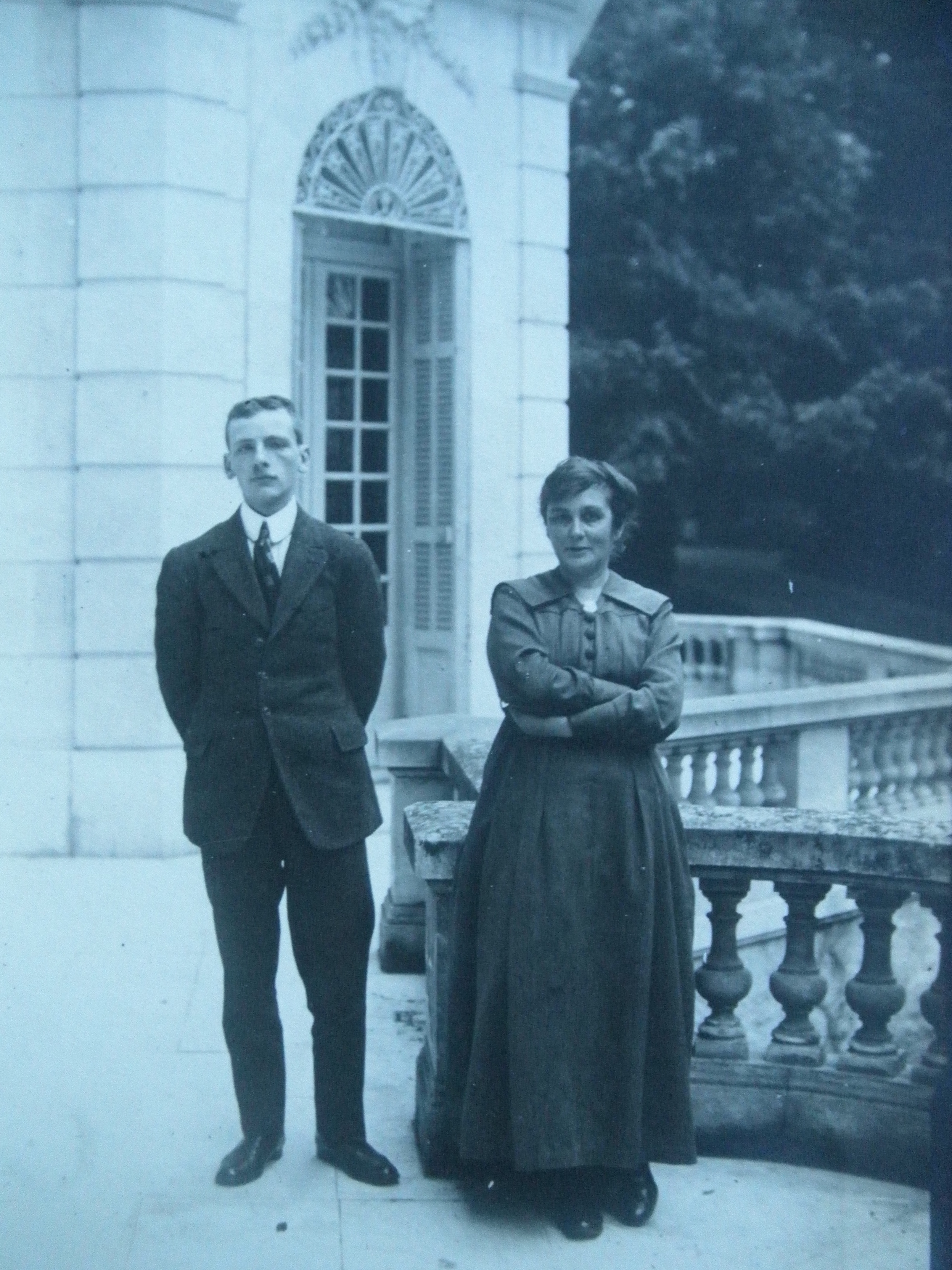 cdfgh